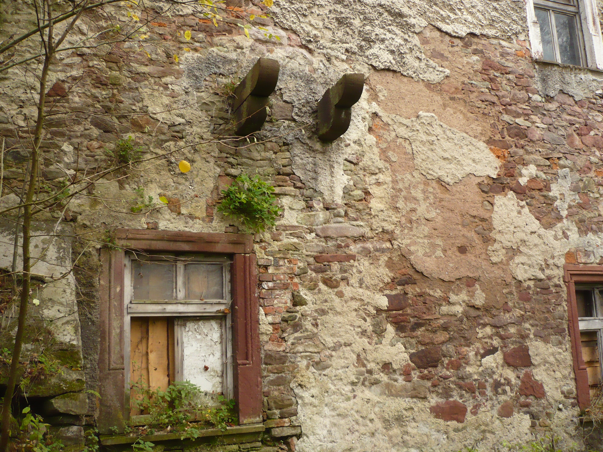 Dwór Dolny Włodowice